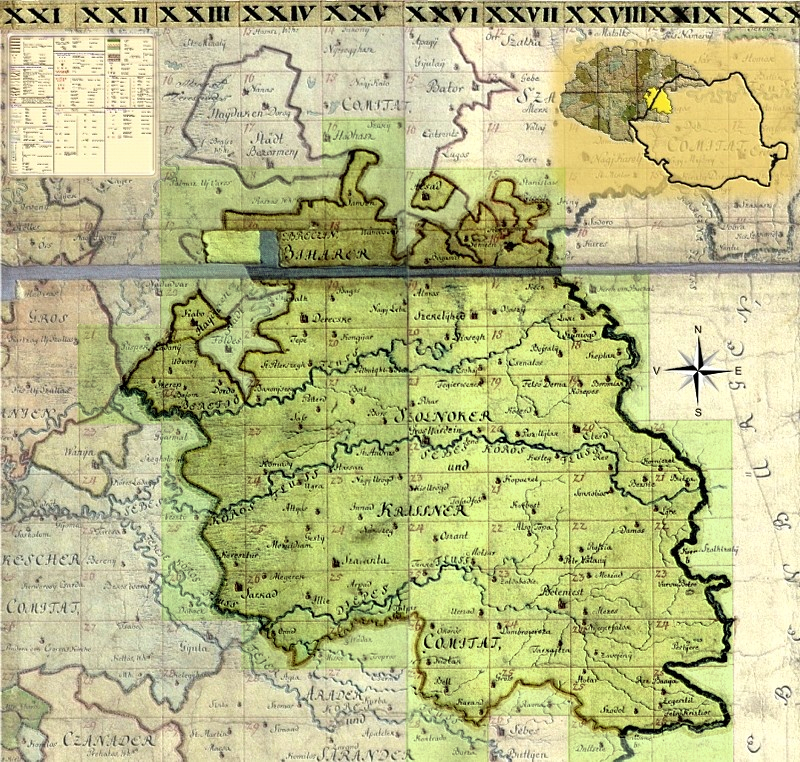 Harta iozefină a Comitatului Bihor-Solnoc-Crasna folosită ca background la formatul de lansare a planşelor, 1782-1785.